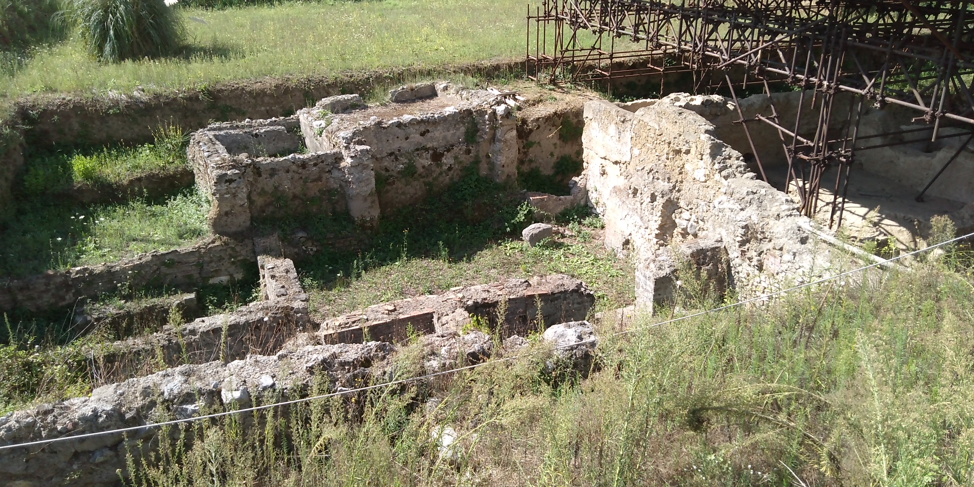 Resti del foro di Nuceria Alfaterno, nel suo parco archeologico